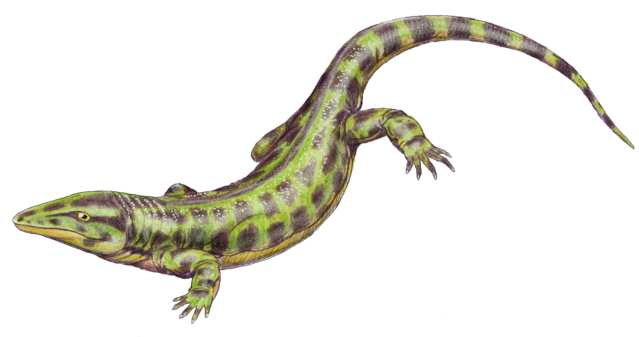 Solenodonsaurus janenschi